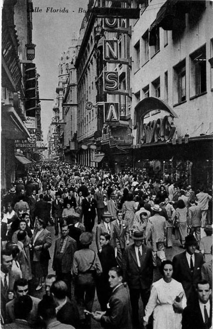 Vista de la calle Florida, principal calle comercial de Buenos Aires, en la década de 1950. Se ve la cuadra del 200, entre las calles Cangallo y Sarmiento.